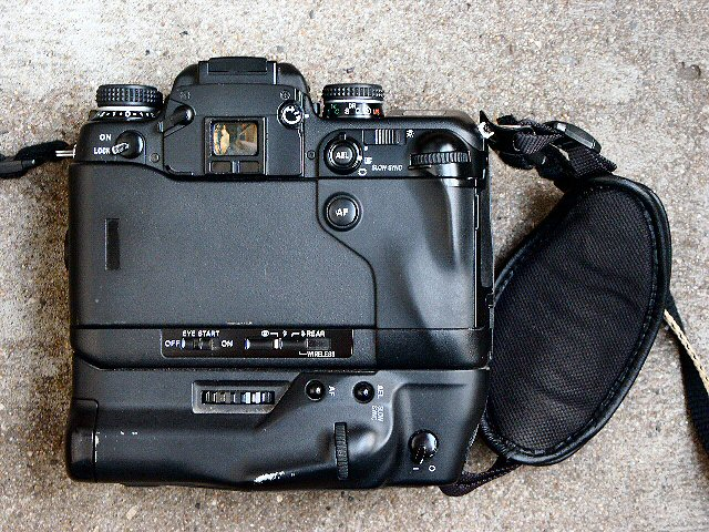 Minolta Dynax 9 - Gehäuse, Rückansicht (Fotografiert mit: Minolta Dimage 7 Hi)